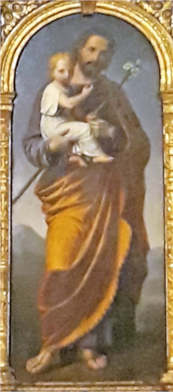 "San Giuseppe" di Angelo Recchia. Parte del polittico dell'altare minore di sinistra della chiesa di San Giorgio in Braida a Verona